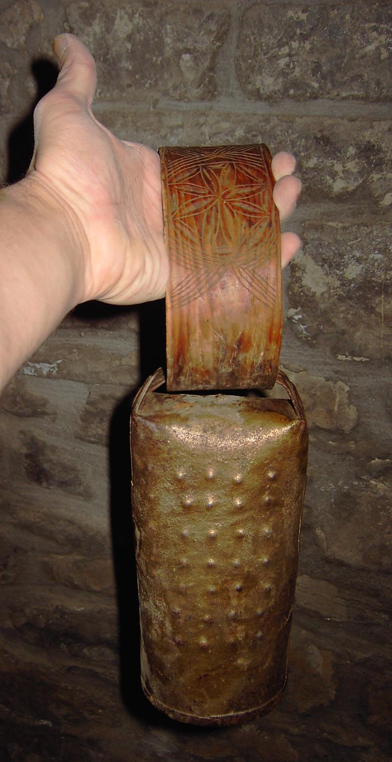 Un truco, el cencerro de gran tamaño característico, que en el Alto Aragón se colocaba en el cuello de los bueyes, carneros, o toros sementales para distinguirlos del resto del rebaño.